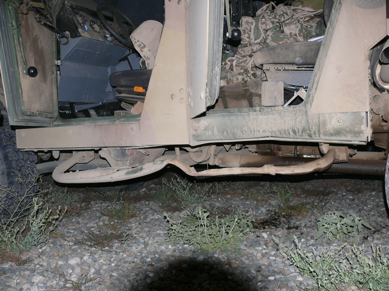 Beschädigter EAGLE IV am 09.07.2009